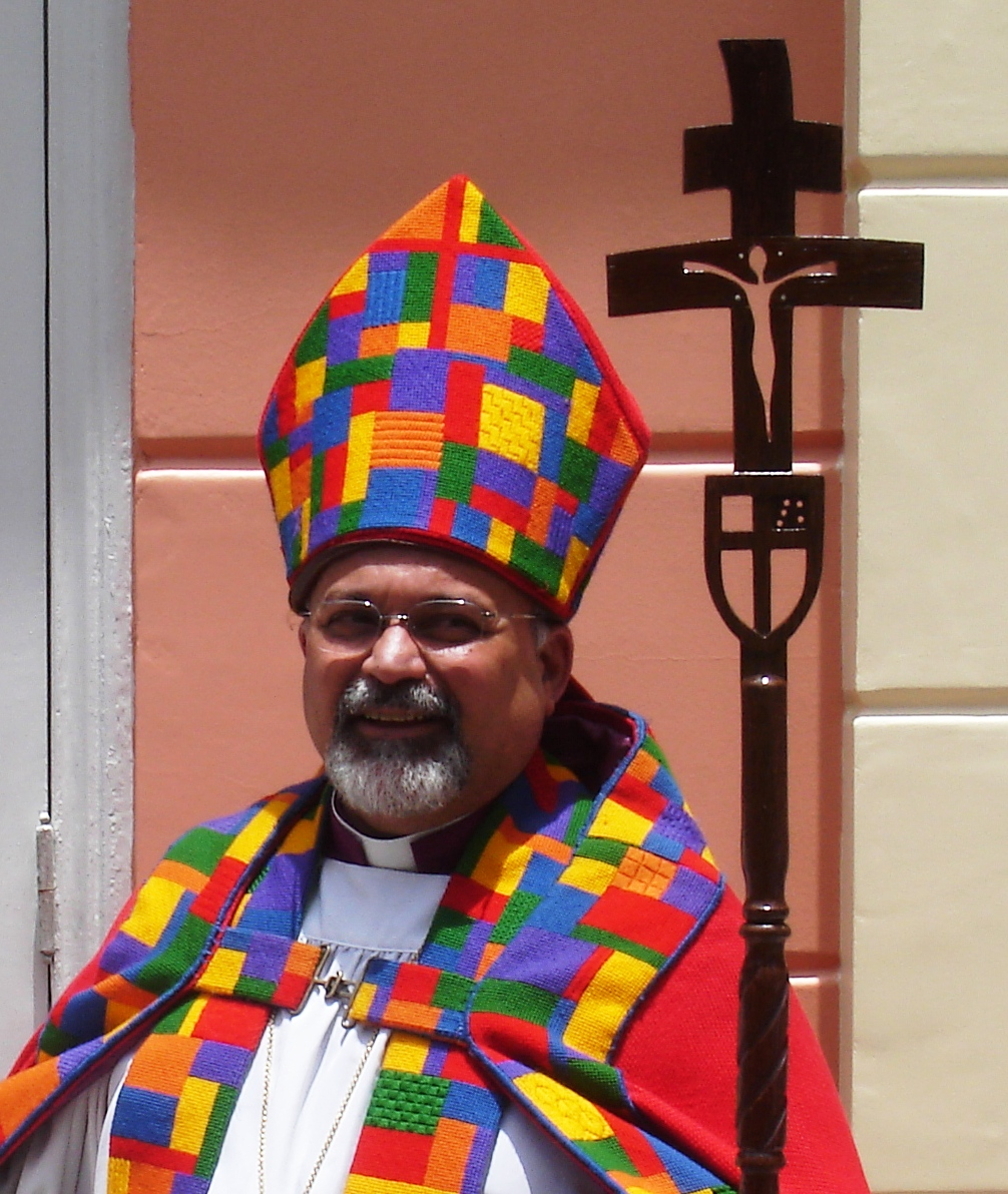 bishop Maurício José Araújo de Andrade, Anglican Episcopal Church of Brazil (Igreja Episcopal Anglicana do Brasil)